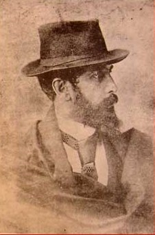 Retrato de Décio Villares (1851-1931)